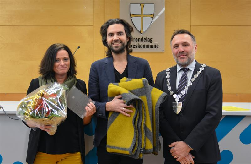 Leder i hovedutvalg kultur, May Britt Lagesen, prisvinner Gjermund Larsen og fylkesordfører Tore O. Sandvik